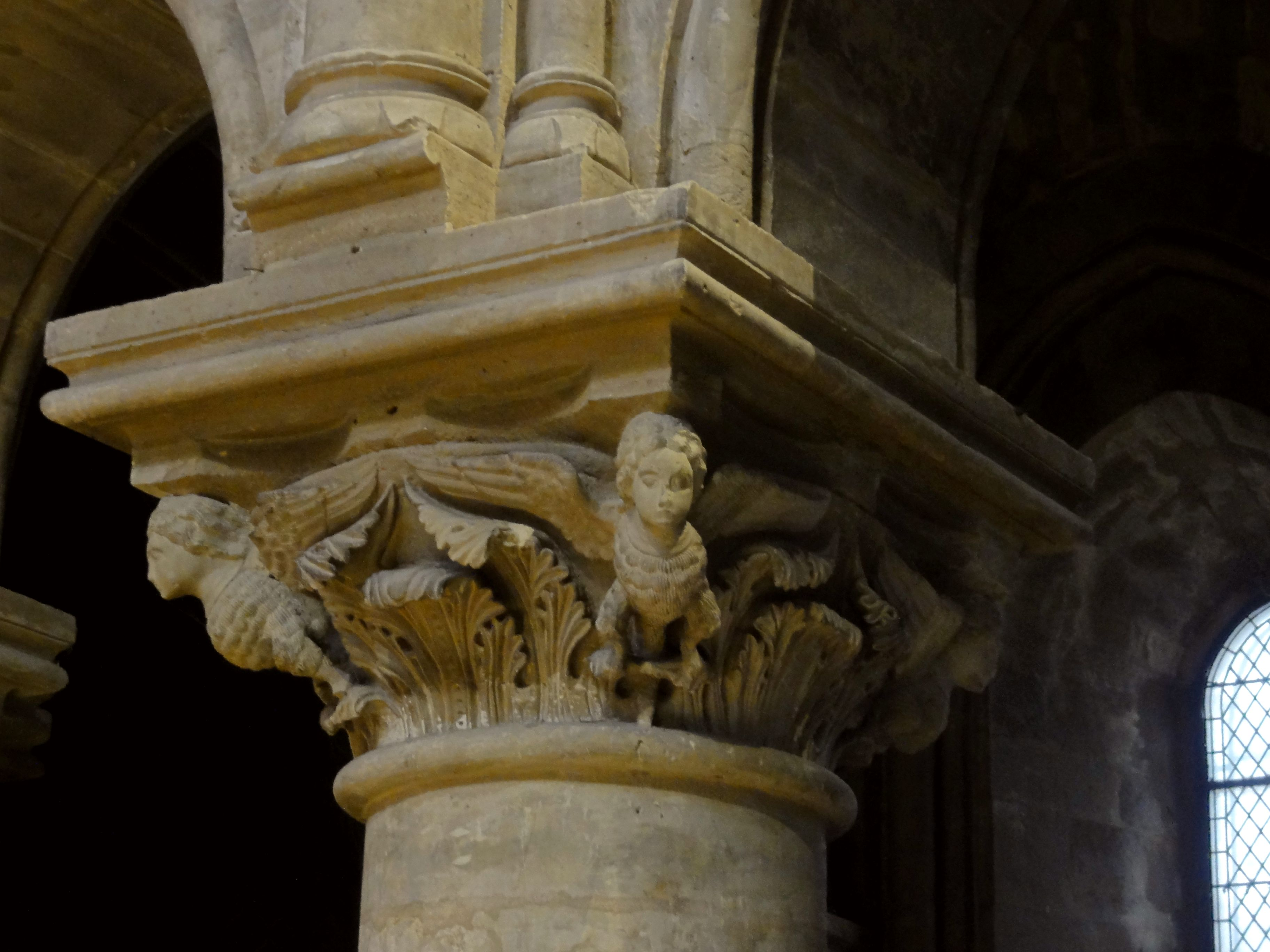 Chœur, grandes arcades du sud, chapiteau central.